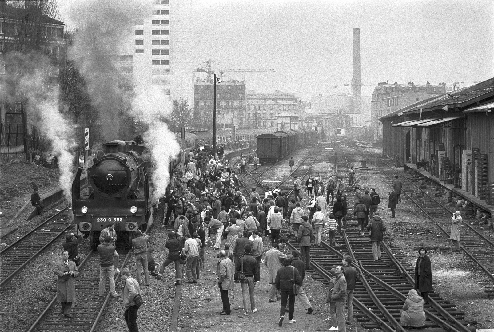 Un train spécial vapeur en gare de Belleville-Villette sur la Petite Ceinture de Paris, le 8 décembre 1985.